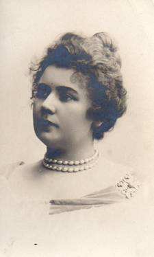 Maikki Järnefelt-Palmgren